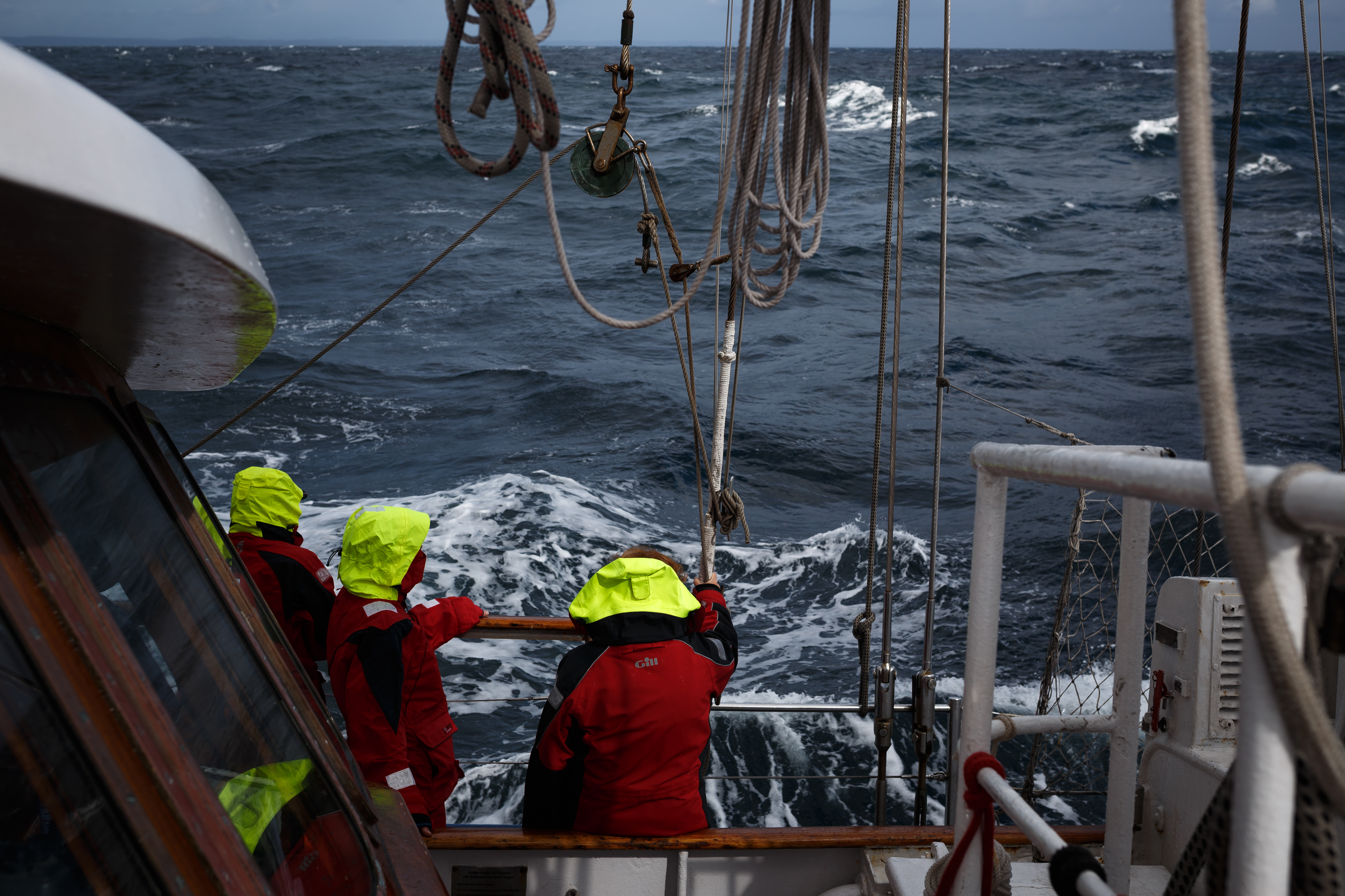 Sturm III